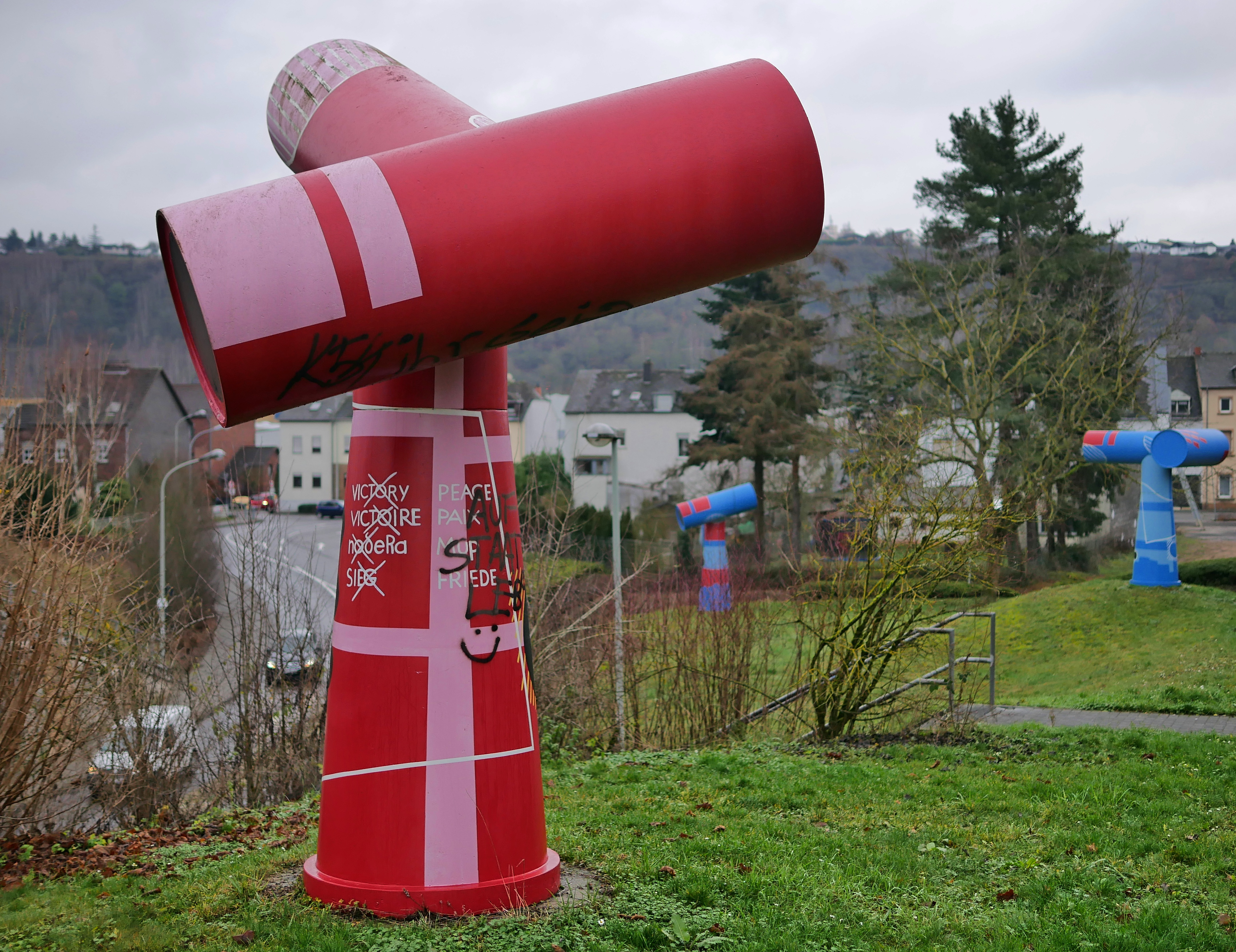 "Drei Entsorgungsmale" von Friedrich Gräsel in Konz beim Bahnhof Kreuz-Konz.